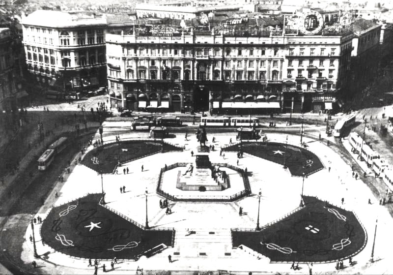 User:Archeologo/Template:Archeologo Categoria:Architetture di Milano